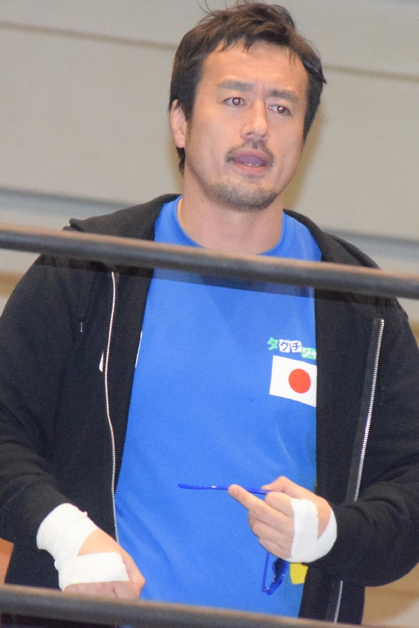 2018年3月1日 大阪府立体育会館・第二競技場 「旗揚げ記念シリーズ」 田口隆祐